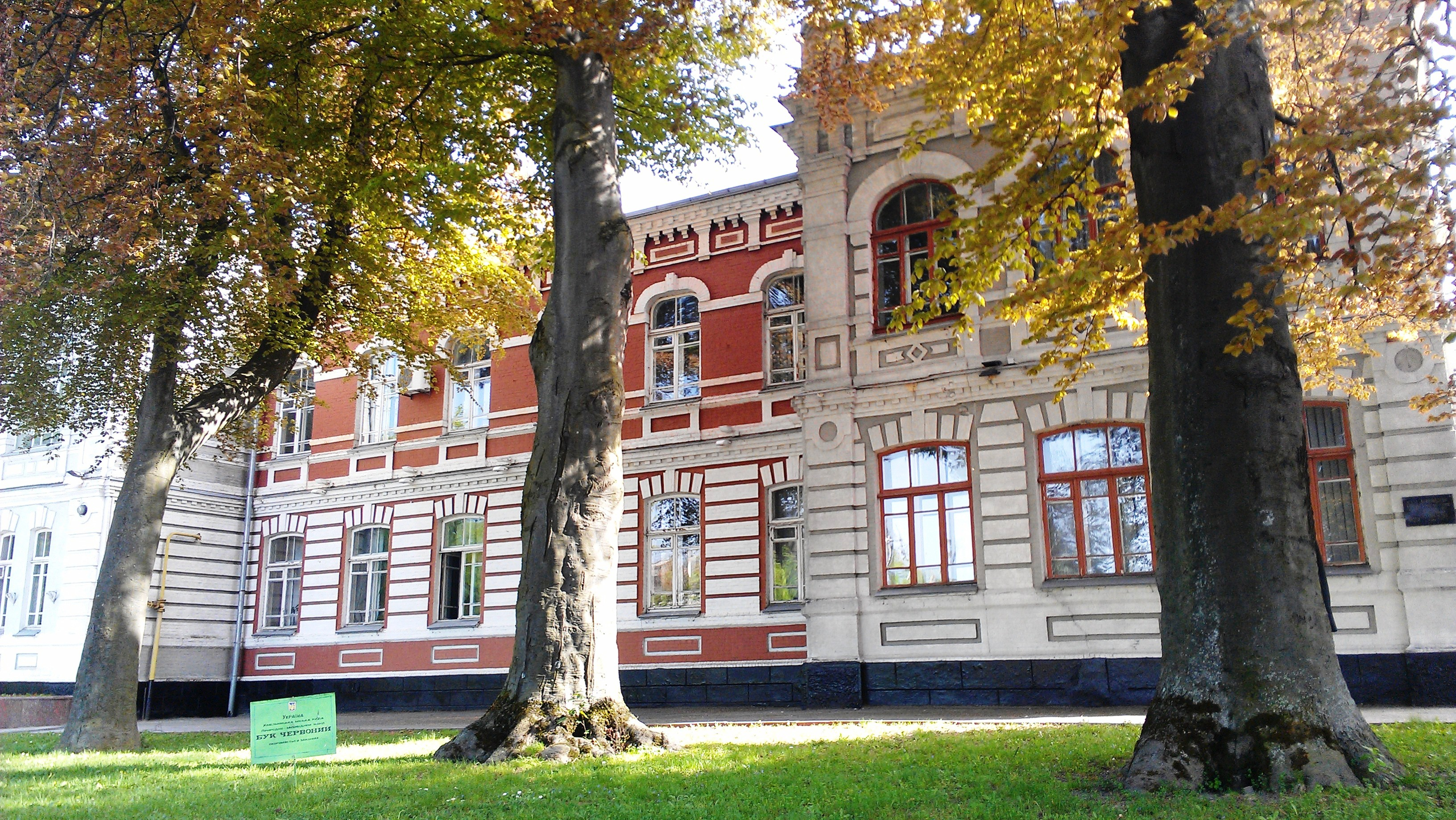 Буки червоні на вулиці Гагаріна, 3. Ботанічна пам'ятка природи.